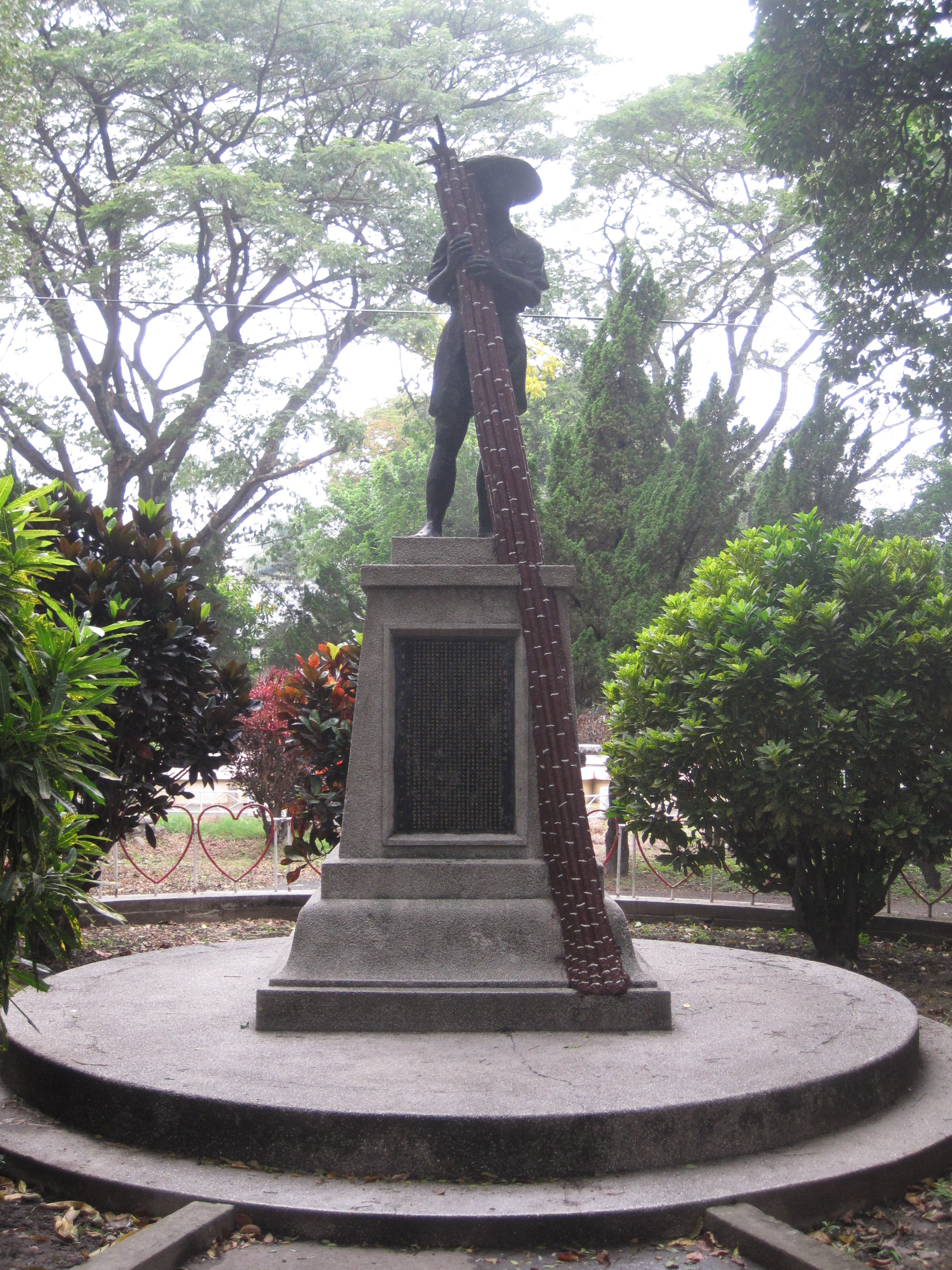 虎尾糖廠的蔗種紀念碑